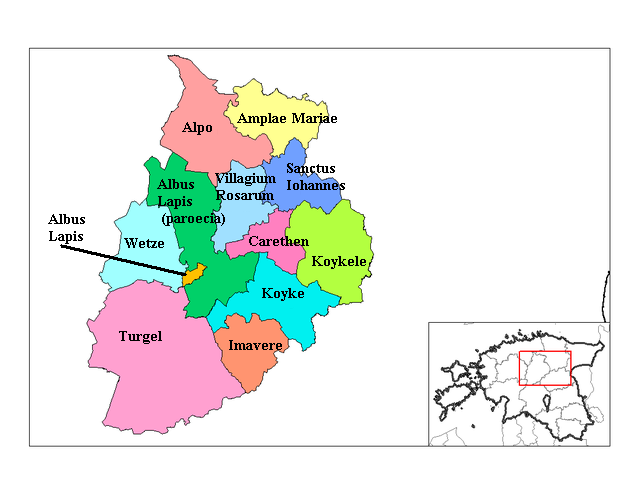 Ierviae municipia Latine